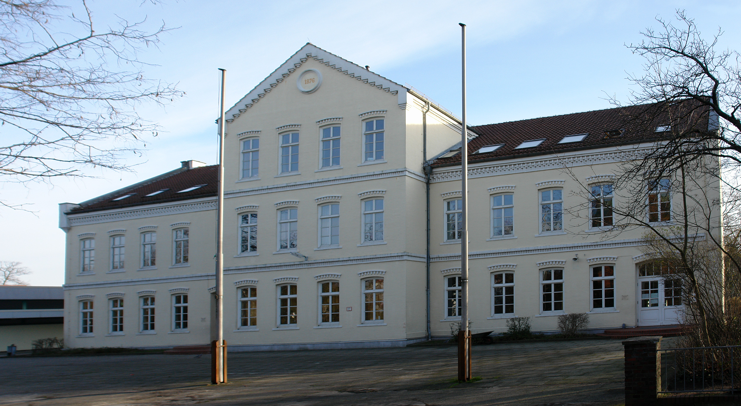 Schule an der Glockenstraße. Hemelingen, Westerholzstraße 19 A. Erbaut 1876